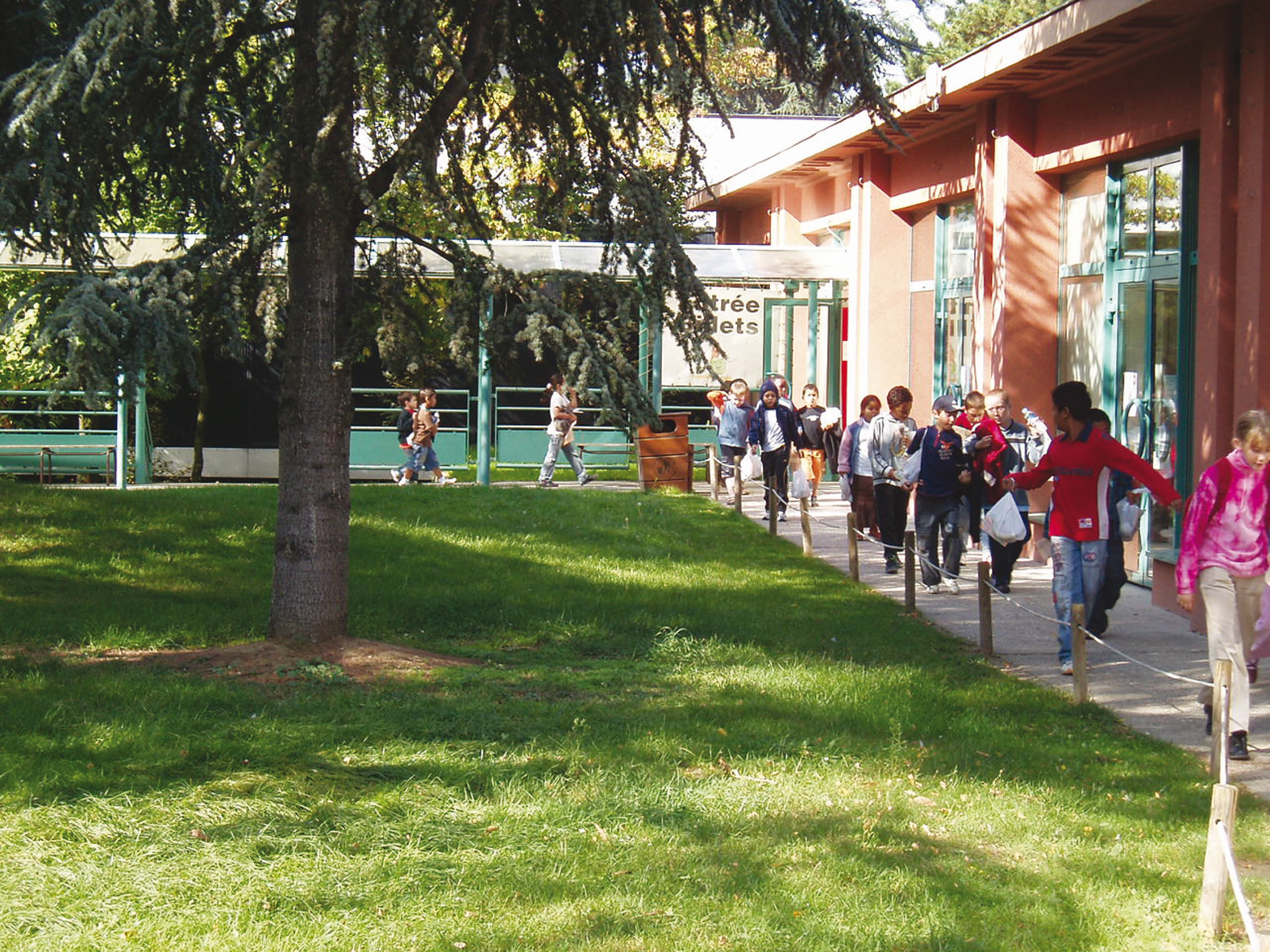 Enfants sortants du Musée en Herbe du Jardin d'Acclimatation.